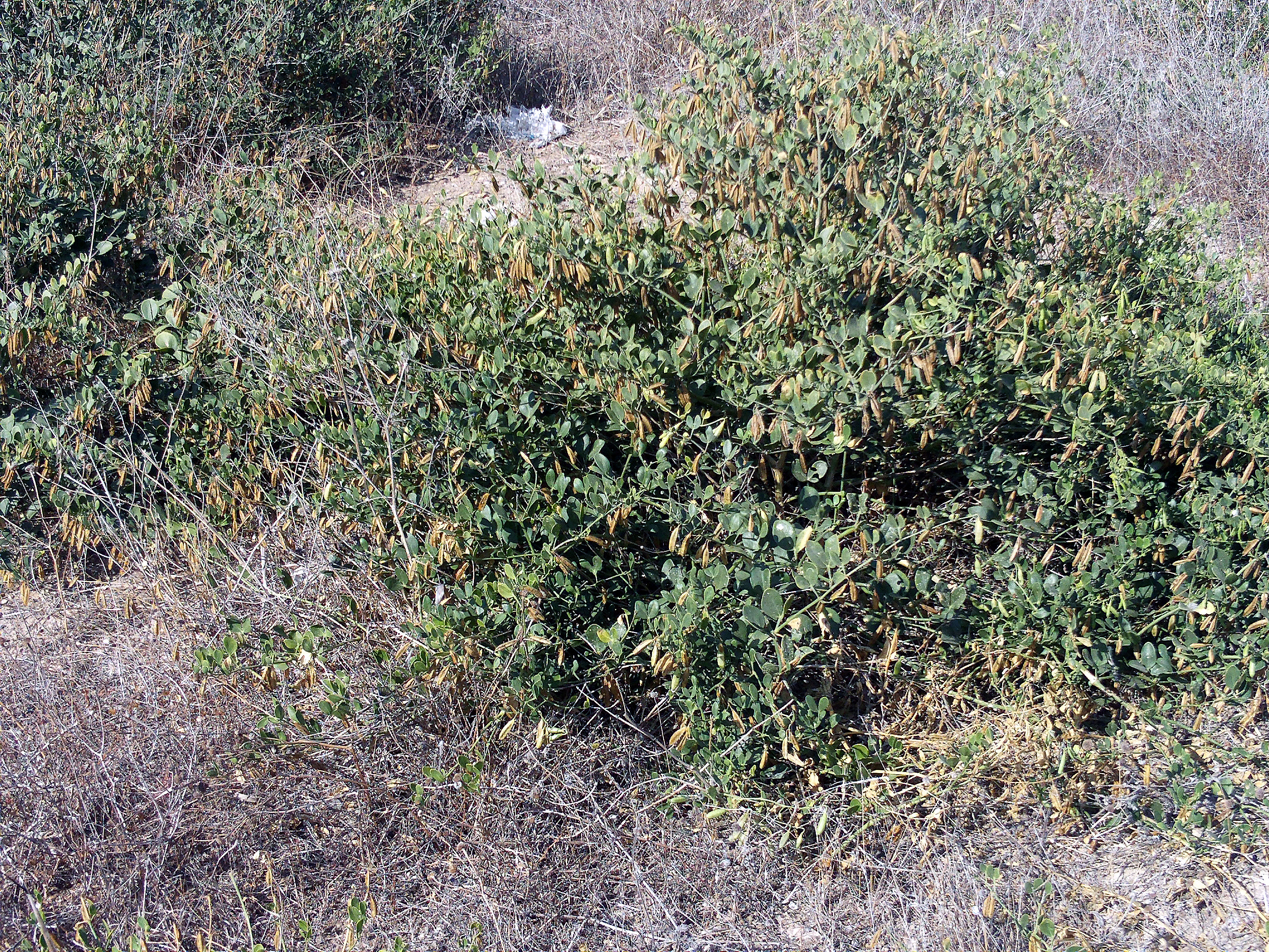 Zygophyllum fabago invasive plant, habitus, Torrelamata, Torrevieja, Alicante, Spain